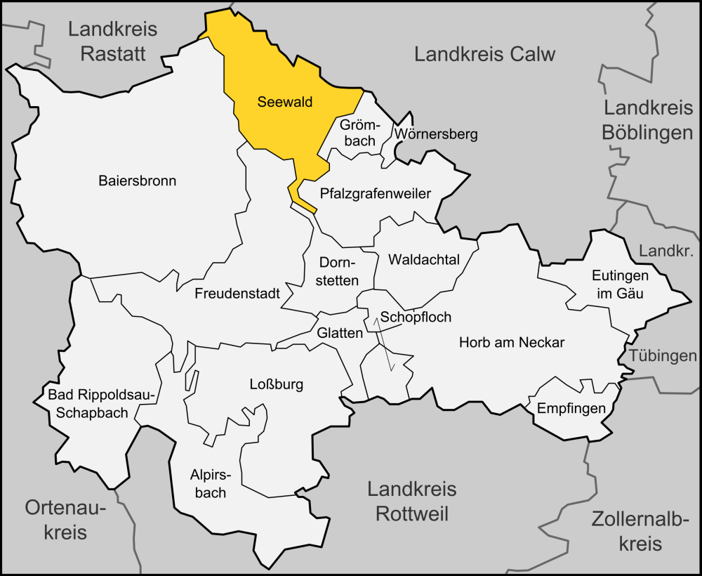 Karte der Gemeinde Seewald im Landkreises Freudenstadt